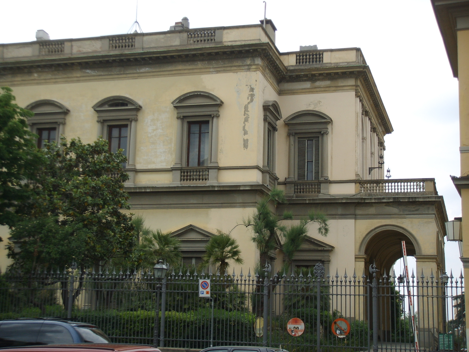 Vllla Favard sul Lungarno